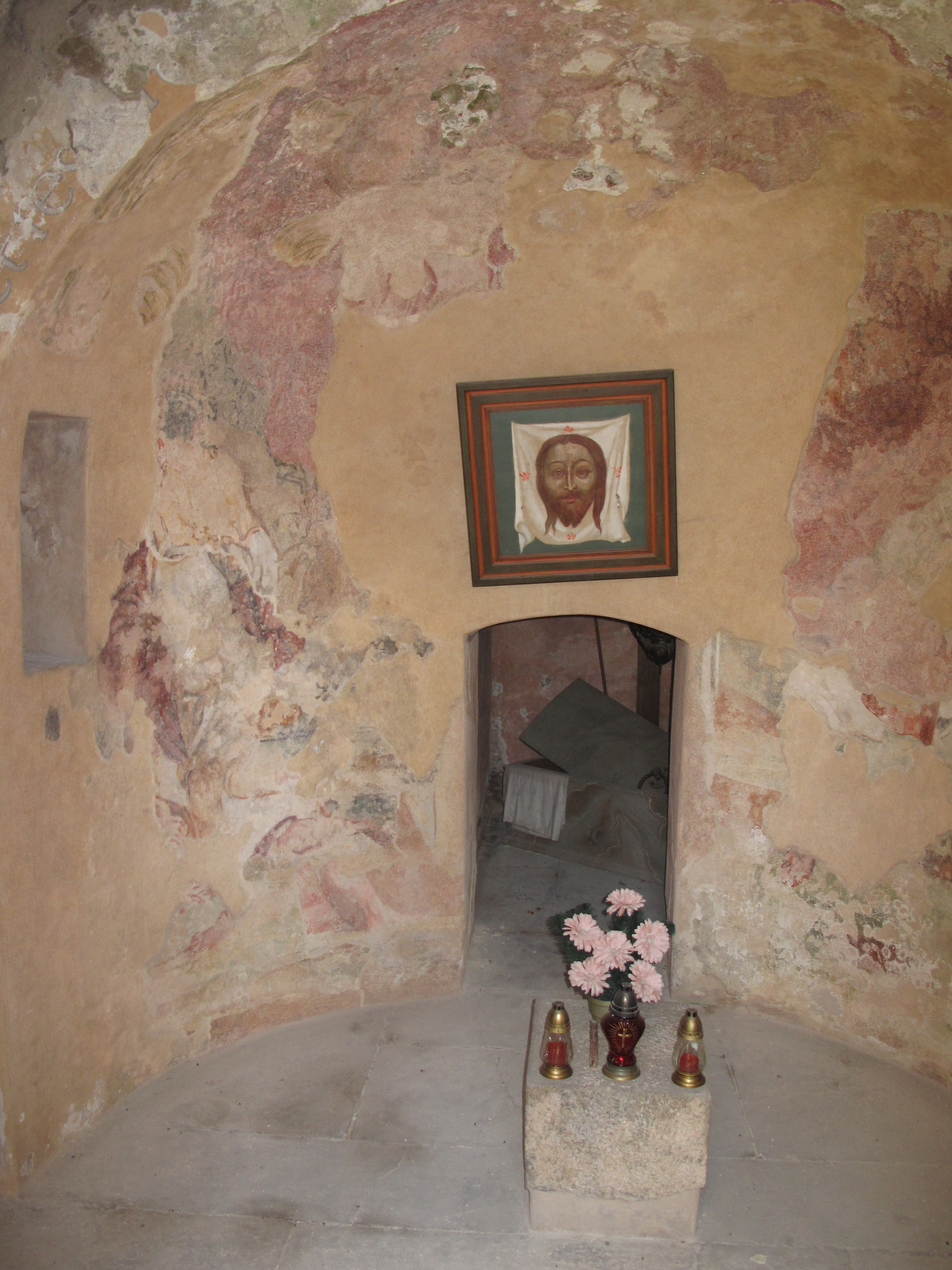 Boží hrob na hřbitově ve Voticích. Okres Benešov, Česká republika.